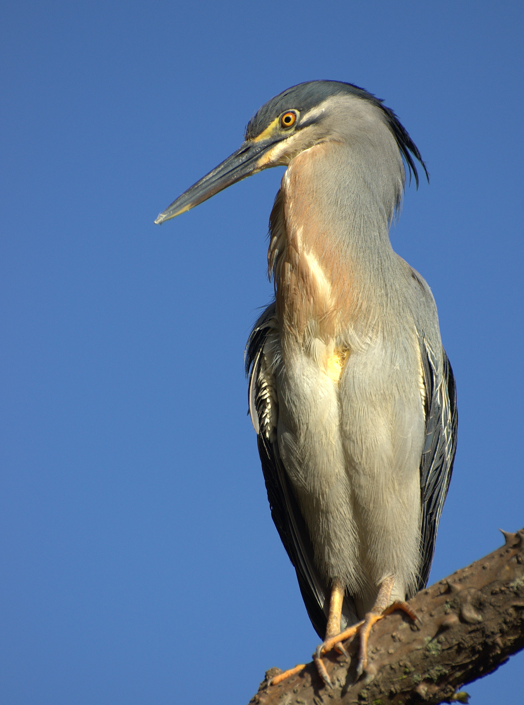 Horto Florestal de São Paulo